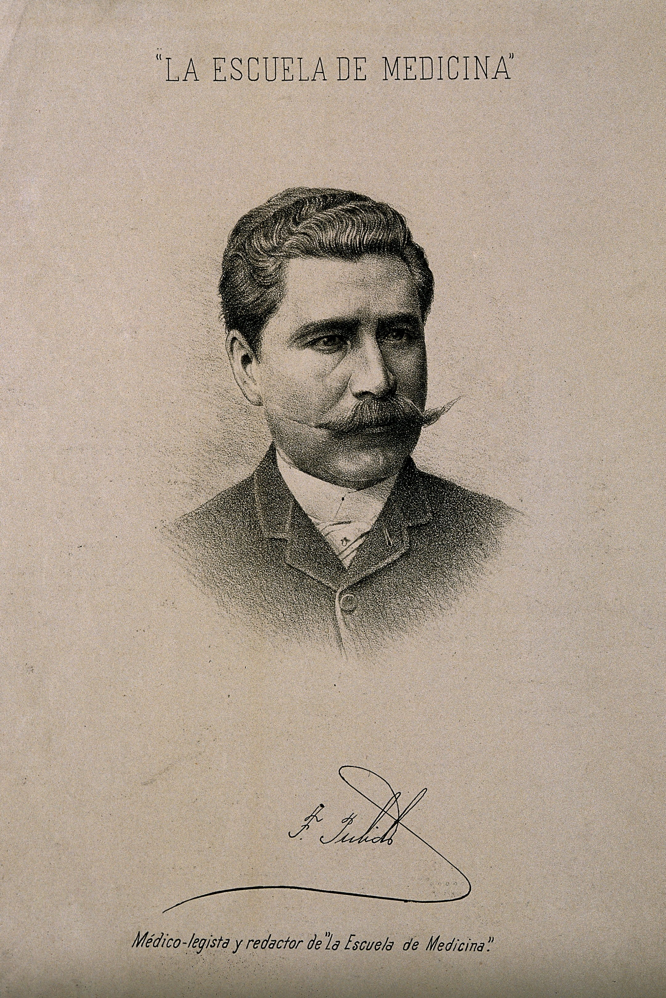 Genre/Technique: Portrait prints. Lithographs. Subject name: Pulido, Angel, 1852-1932.